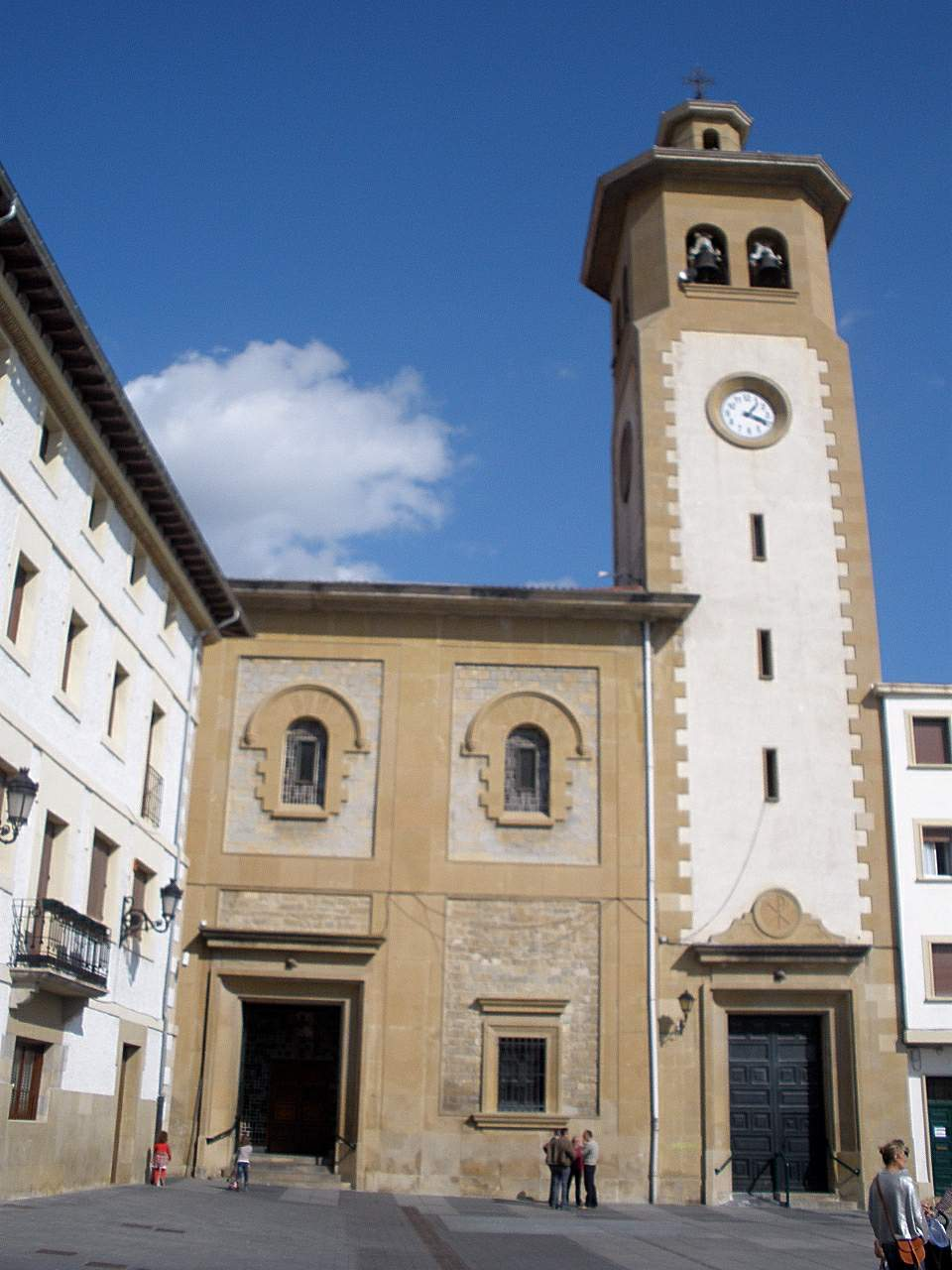 Iglesia de San Andrés (Villava, Navarra)